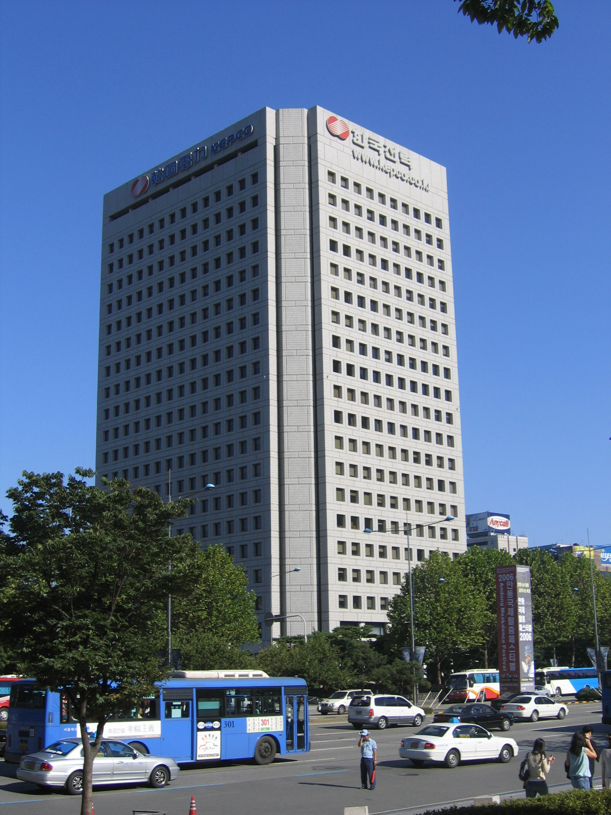 KEPCO building in Samsung-dong, Kangnam-Gu, Seoul, Korea.